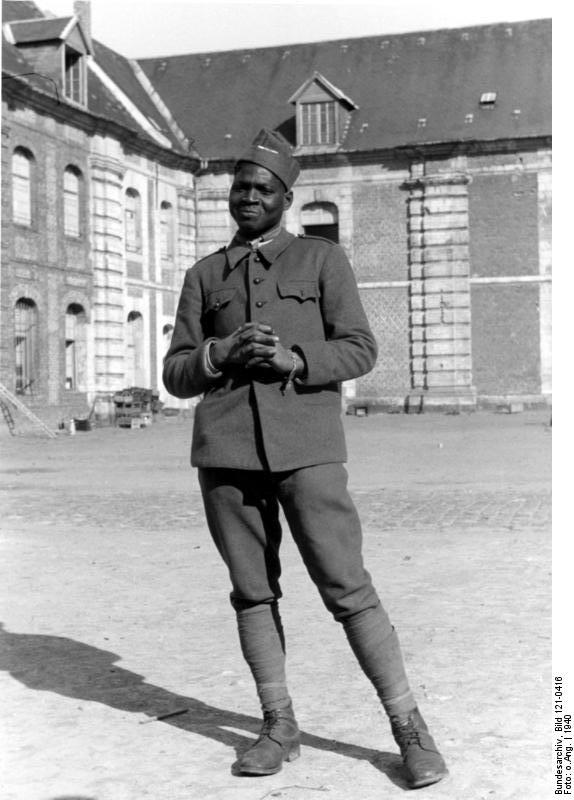 Gefangener französischer Soldat